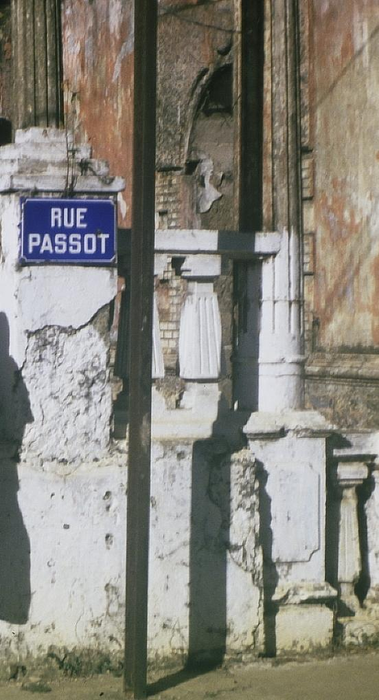 IMAGE PRIVEE DE LA RUE PASSOT A MADAGASCAR PRISE EN VACANCE QUE JE METS A DISPOSITION DE WIKIPEDIA Utilisateur:JOPE MARESSOT